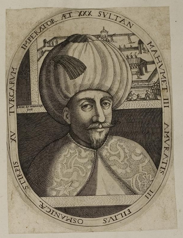 Grafik aus dem Klebeband Nr. 1 der Fürstlich Waldeckschen Hofbibliothek Arolsen Motiv: "Mahmet III Amuratis III Filius Osmanicae Stirpis XV Turcarum Imperator Aet. XXX Sultan" (Mehmed III.)